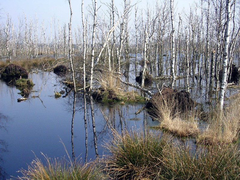 Hohes Moor bei Stade: Abgestorbener Birkenwald in Wiedervernässungsfläche